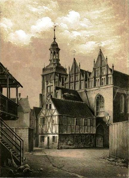 Gdańsk Stare Miasto, ul. Brygidki / Profesorska 17 - kościół klasztorny brygidek, obecnie, rzymskokatolicki parafialny p.w. św. Brygidy (Bazylika mniejsza), XIV/XV, XVII, po 1958